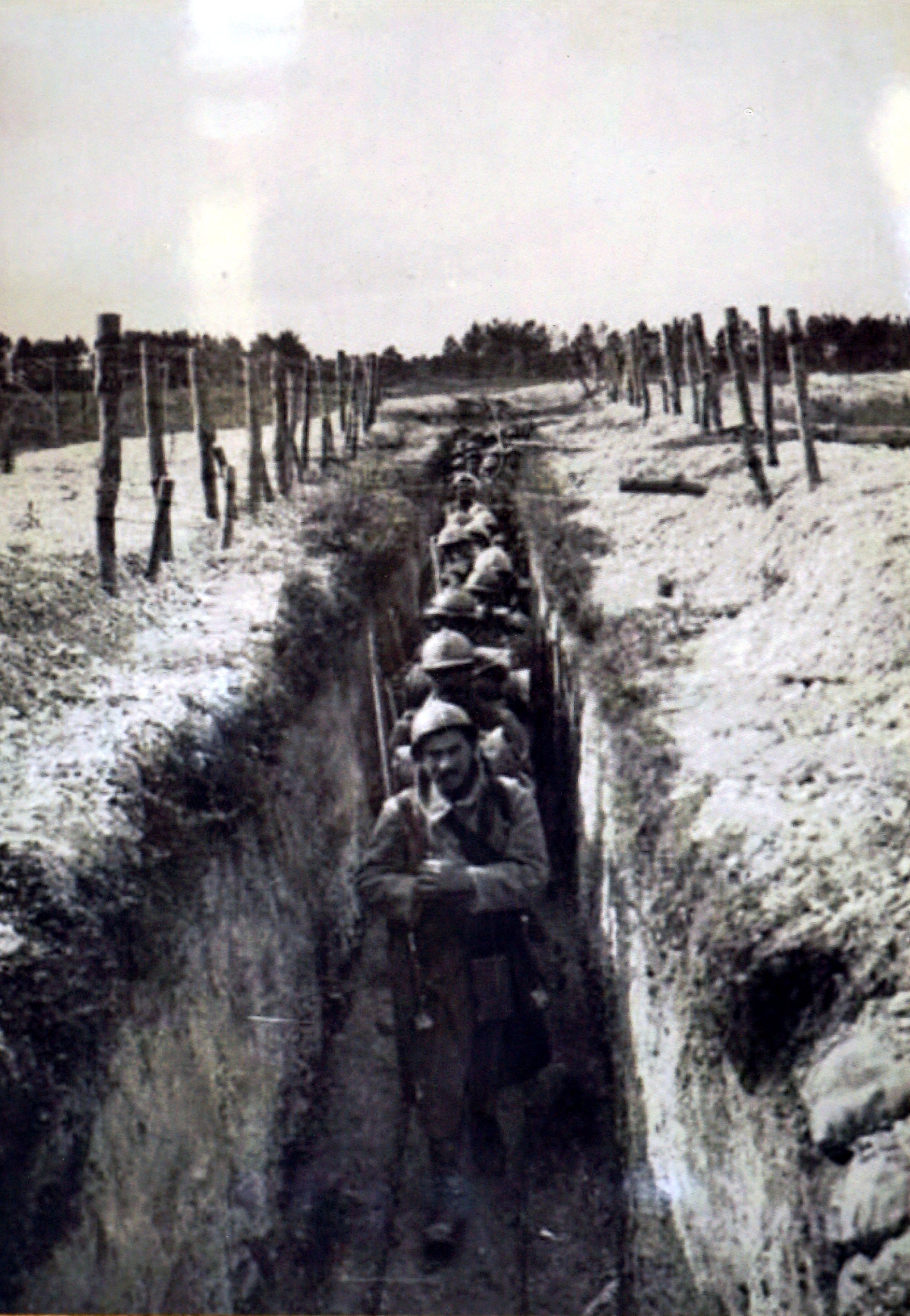 lors de la bataille des monts de champagne.